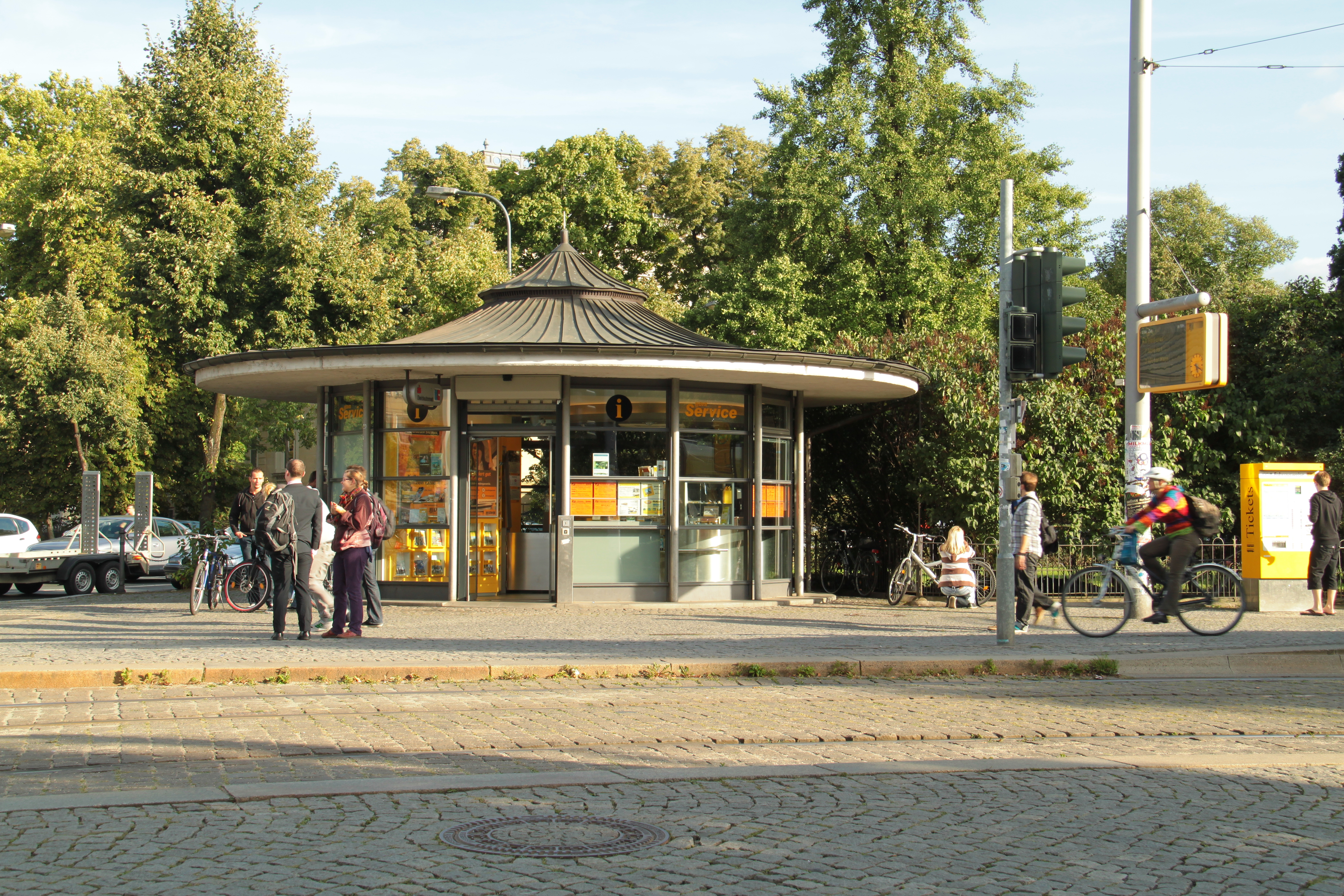 Impressionen Dresden, Albertplatz